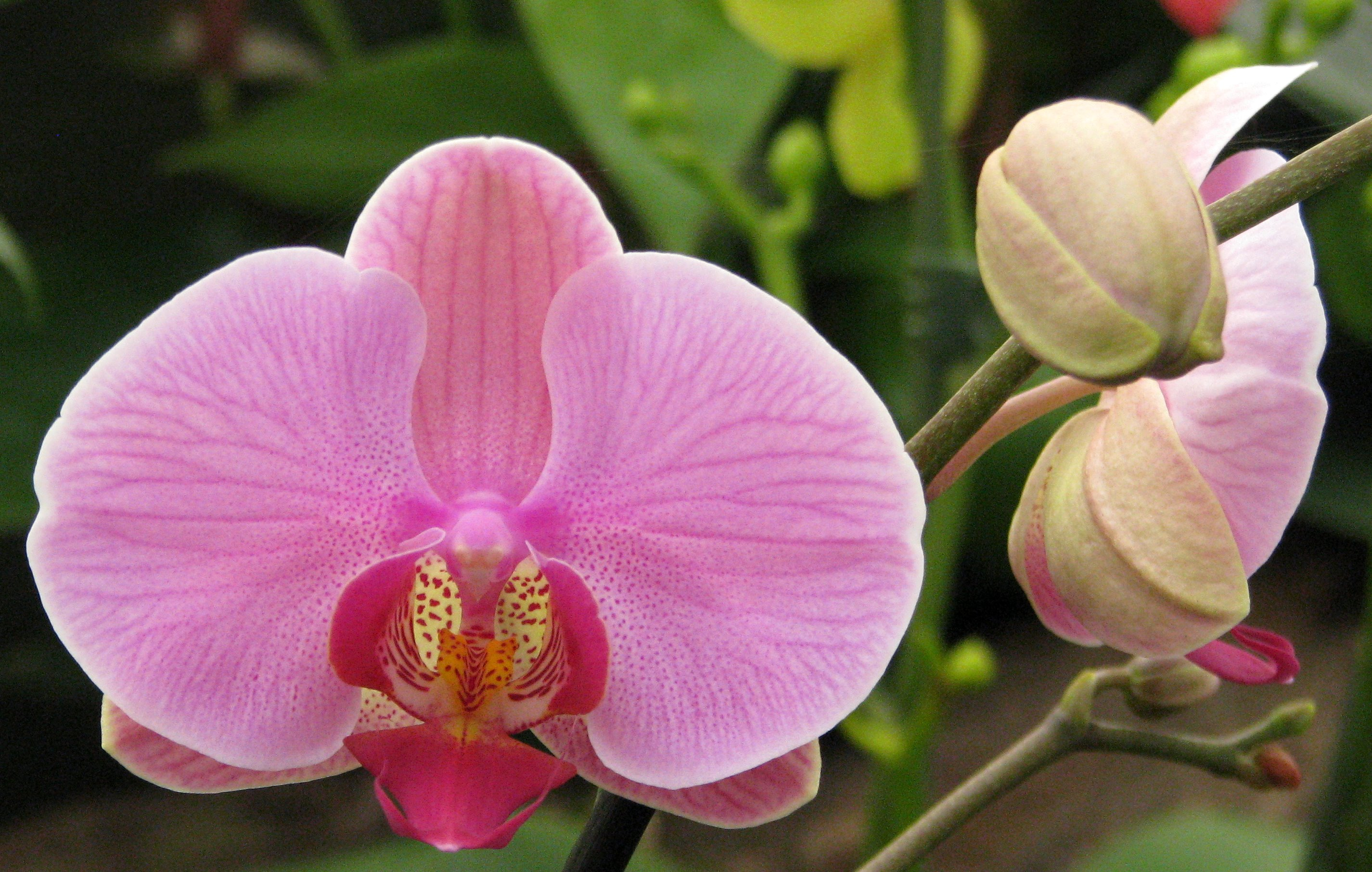 Orhideje, arboretum Volčji potok, Slovenija